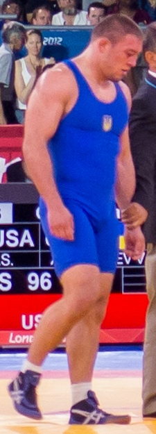 Valerii Andriitsev